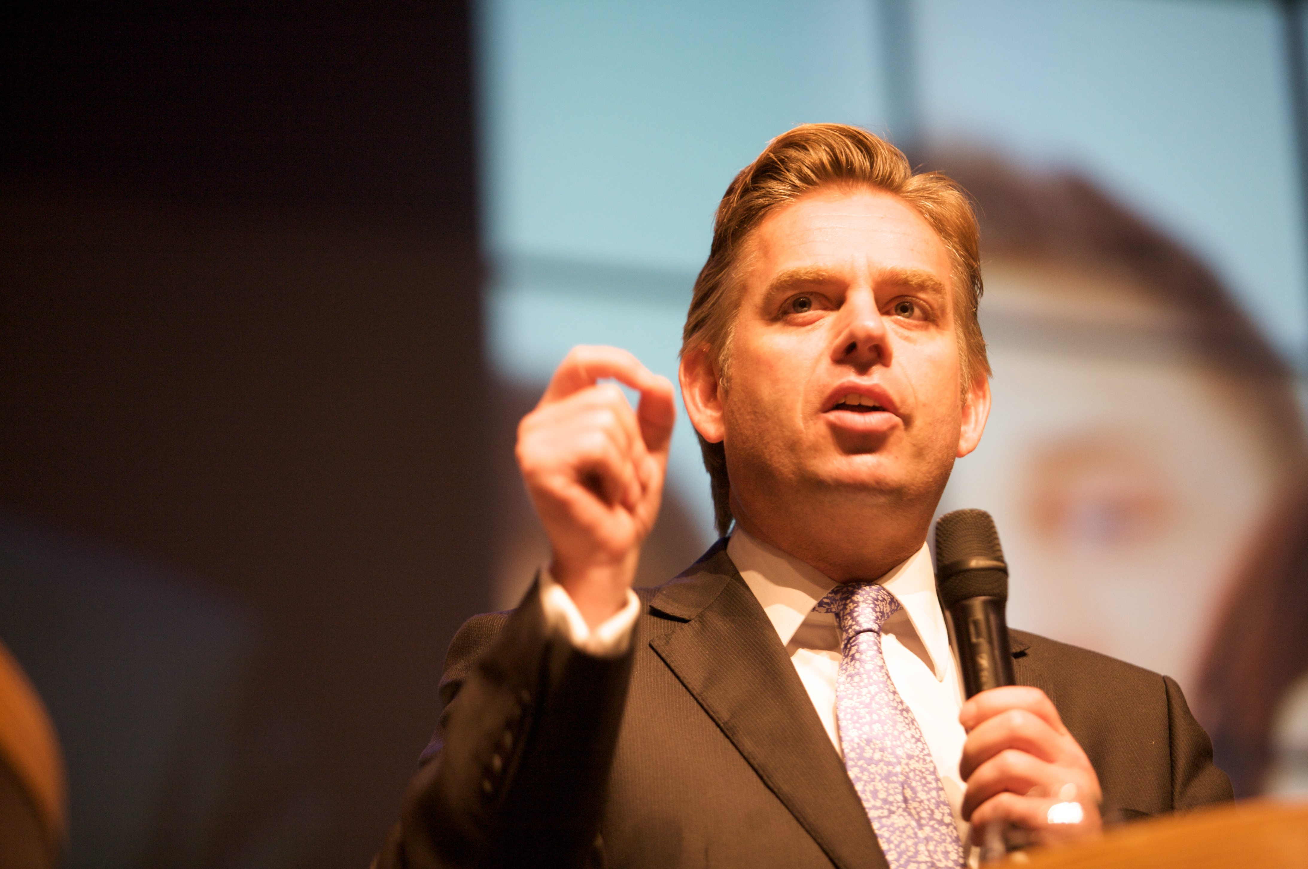 D66 congres 07-11-09 Breda